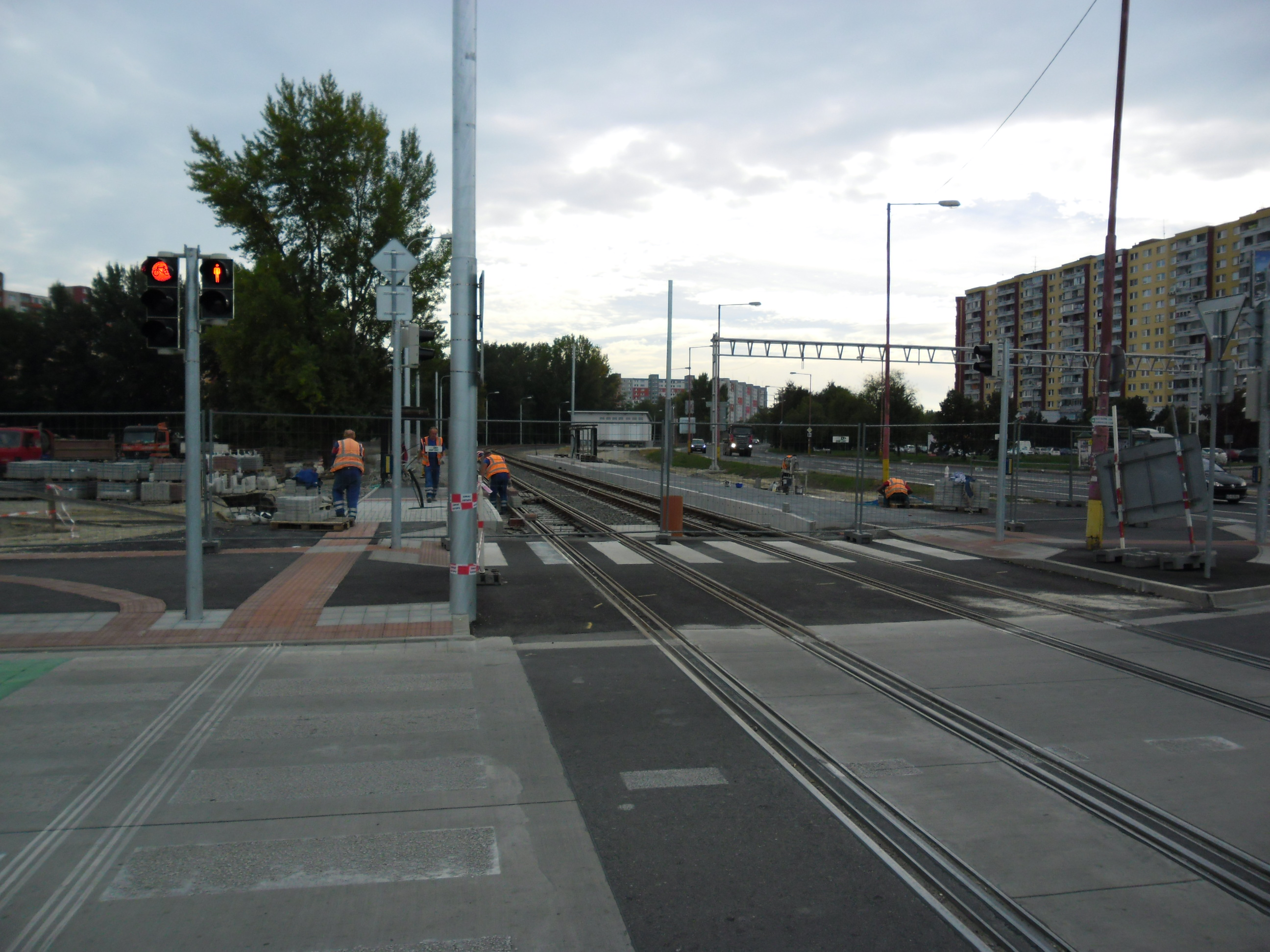 Stav výstavby električkovej trate do Petržalky 3. októbra 2015. - zastávka Farského